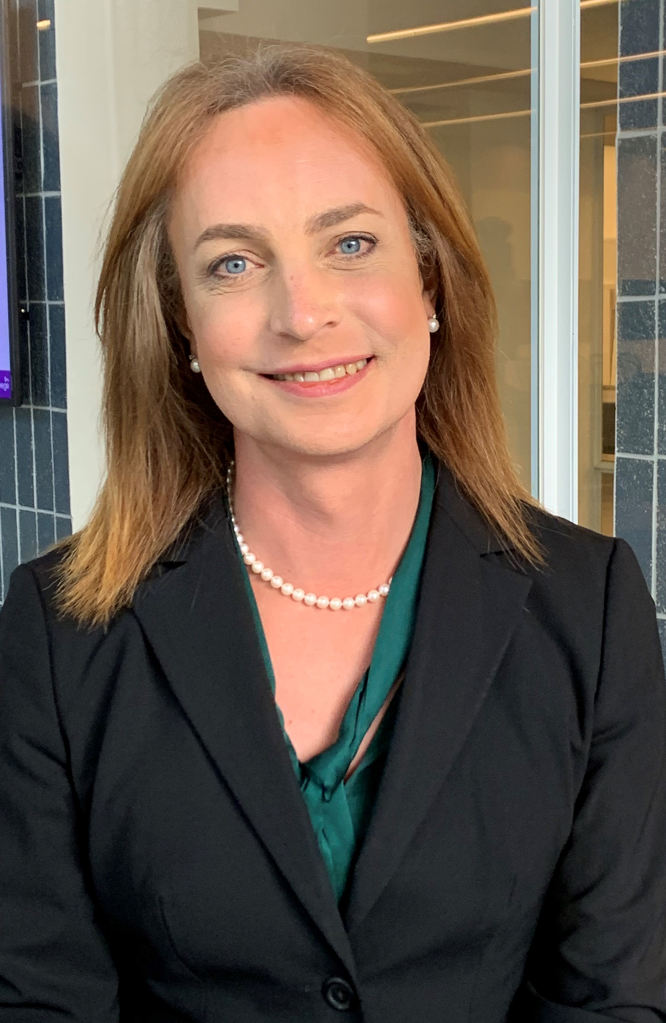 Caroline Farberger september 2019